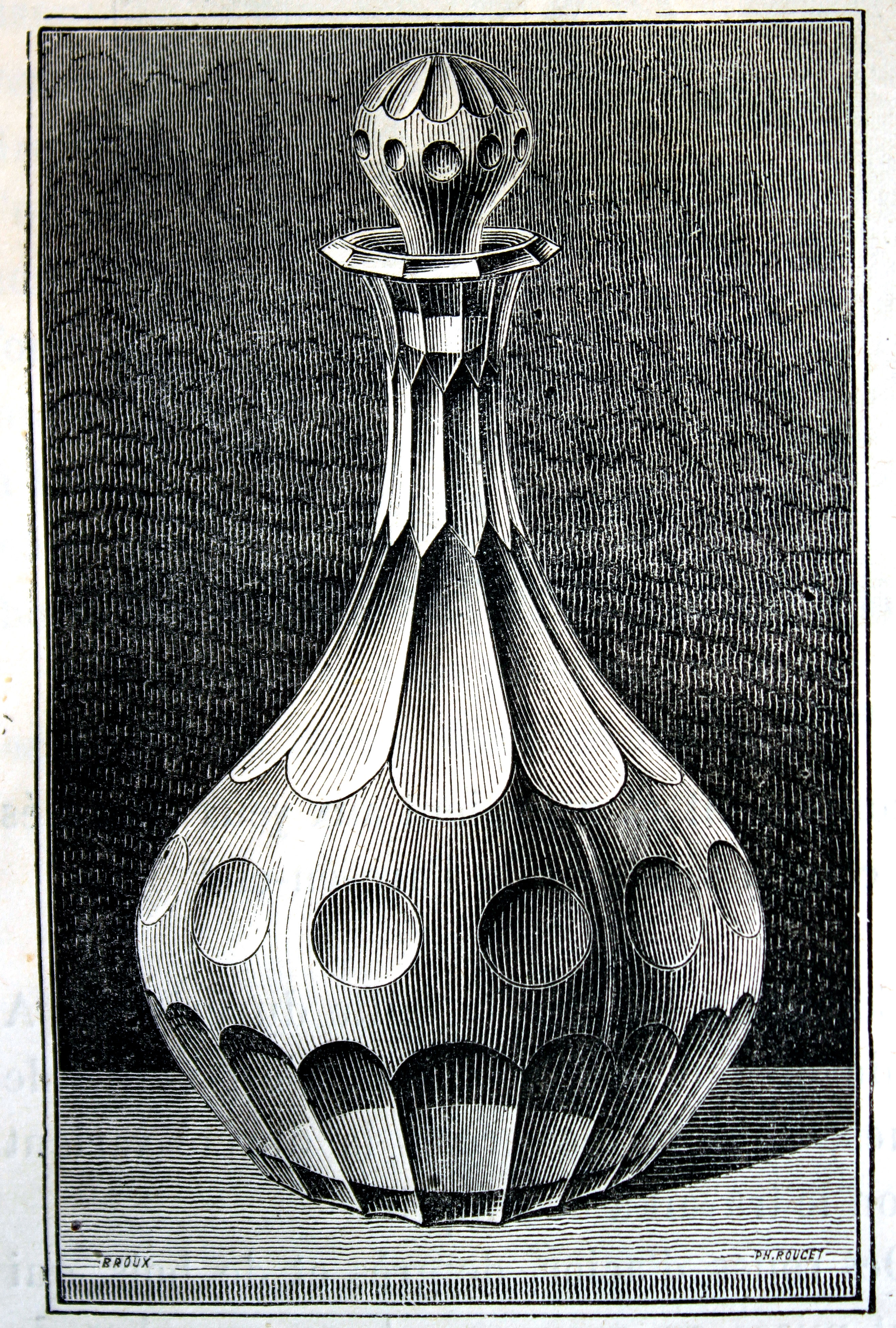 Ilustraciones de la obra : Les merveilles de l'industrie ou, Description des principales industries modernes / par Louis Figuier. - Paris : Furne, Jouvet, [1873-1877]. - Tome I